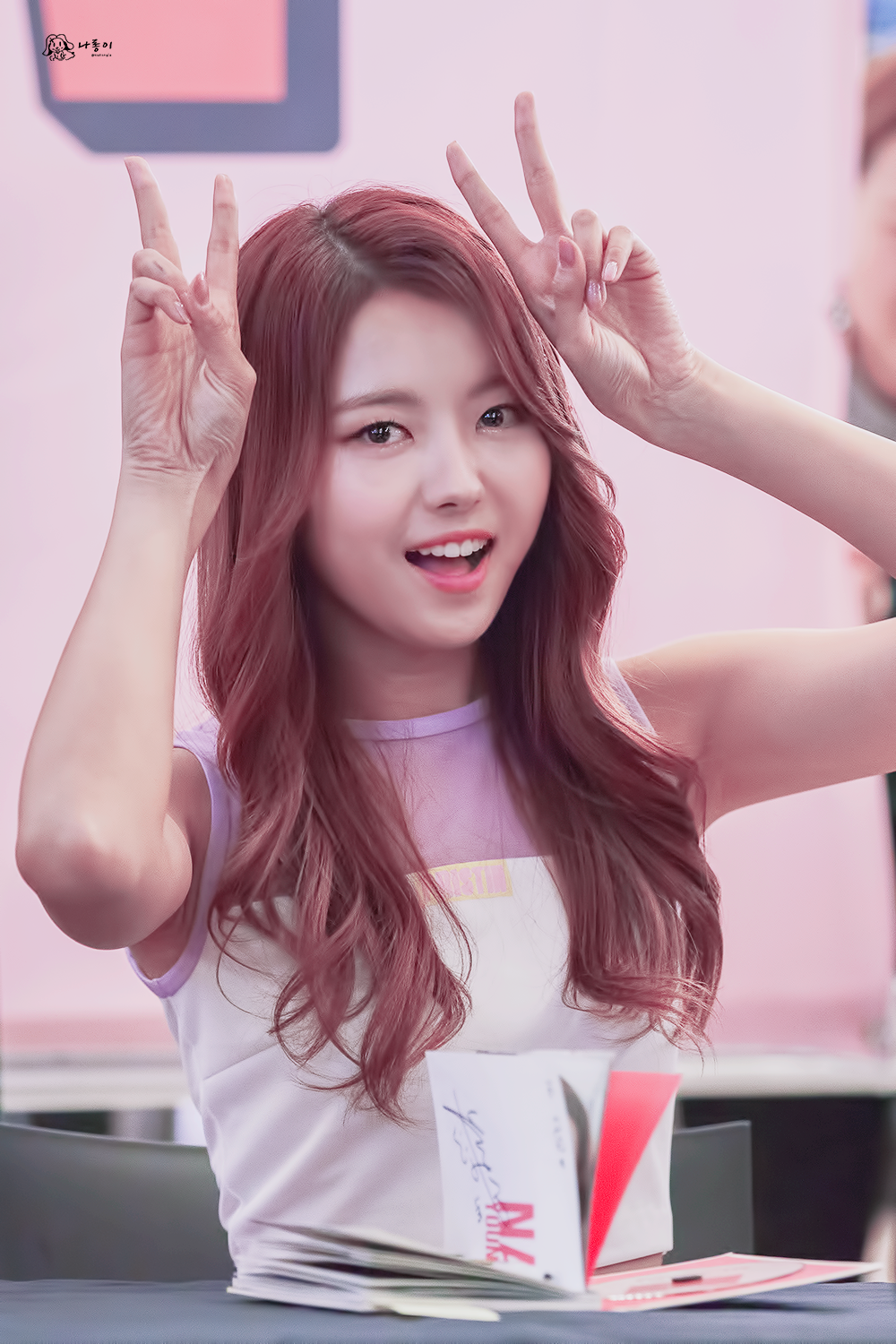 조선말: 170325 여의도 팬사인회